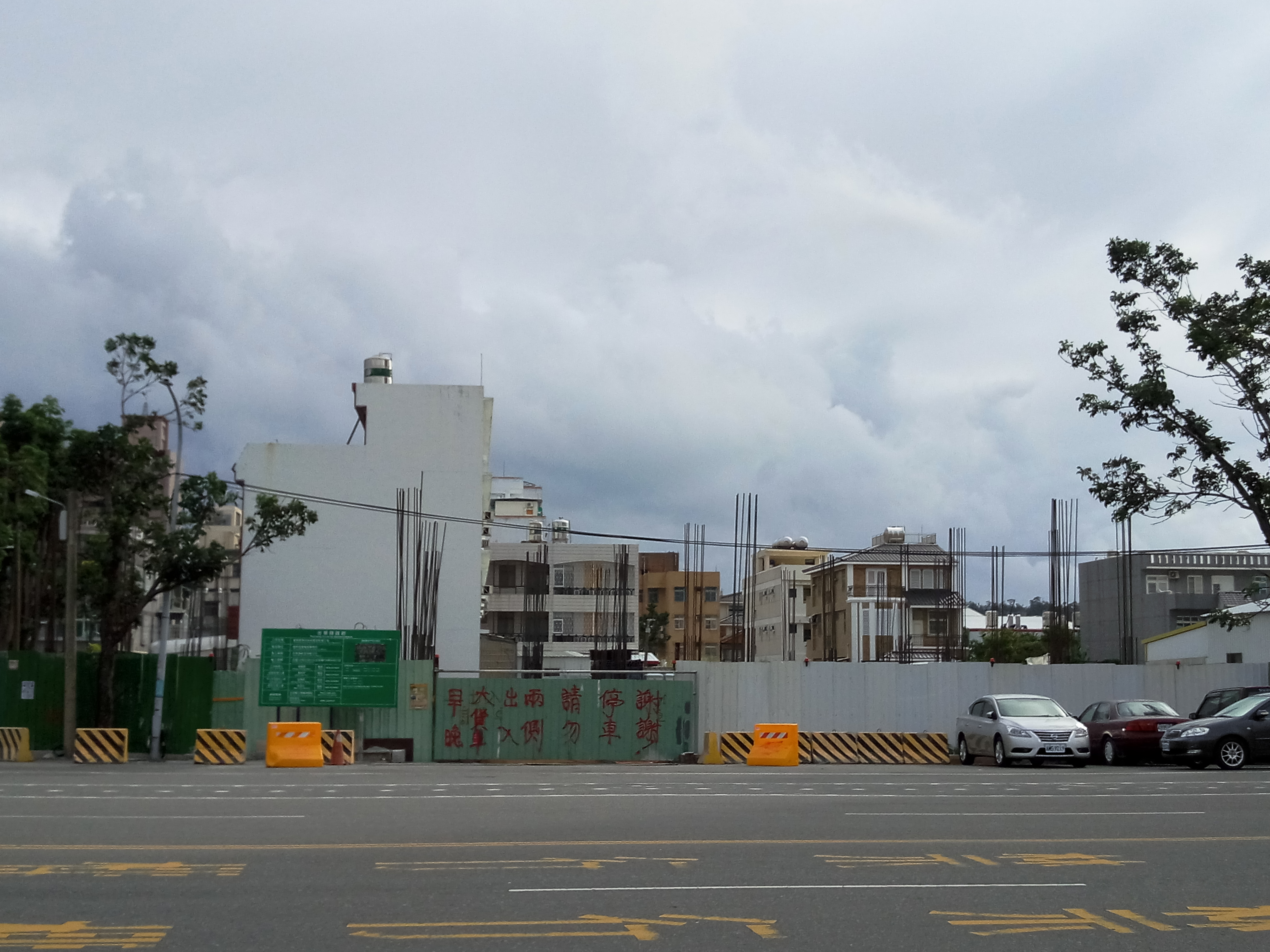 臺東縣消防局舊址，位於臺東縣臺東市四維路三段1號，現已拆除另作用途。